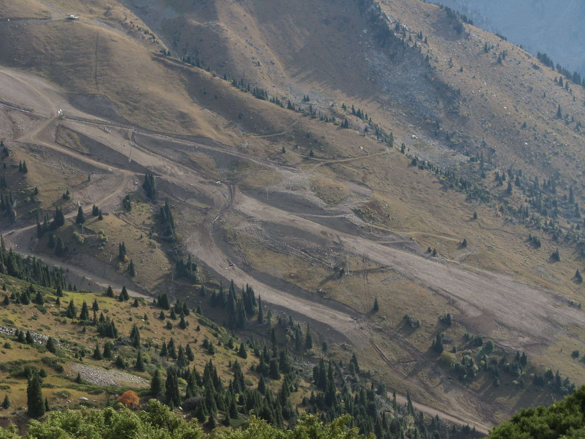 Деградация почвенного покрова склонов горнолыжного курорта Шымбулак в результате реконструкции.